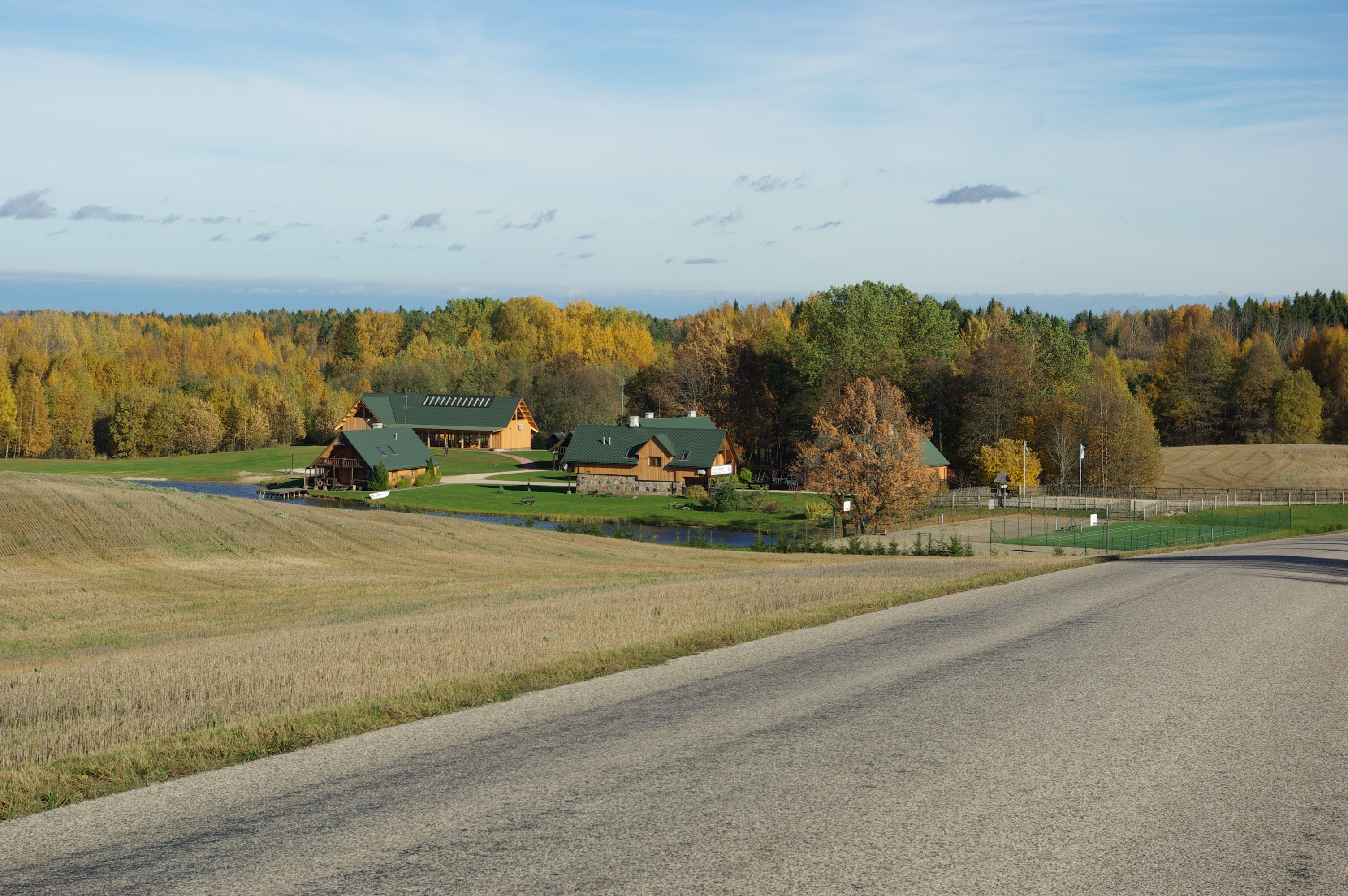 Vaade Setomaa turismitalole